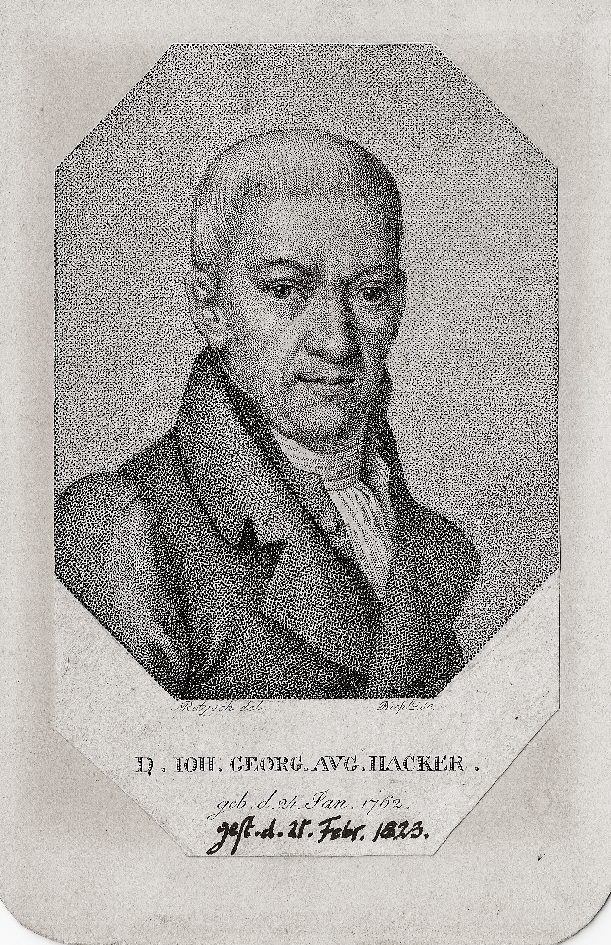 Punktstich um 1800 von Ernst Ludwig Riepenhausen nach einer Zeichnung von Moritz Retzsch; um 1910 per Hand nachträglich dazugeschriebenes Sterbedatum des Abgebildeten